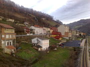 Foto de Piñeres